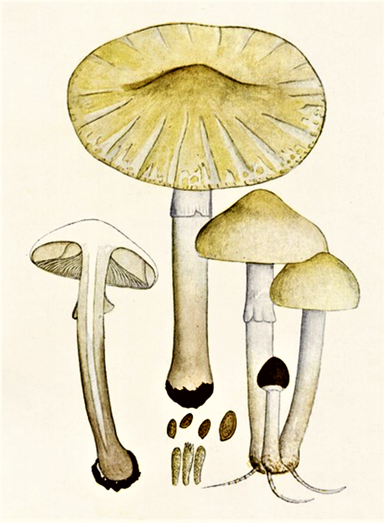 Giacomo Bresadola: Pholiota praecox (Pers., 1800) Kumm. (1871), heute Agrocybe praecox (Pers., 1800) Fayod (1889)